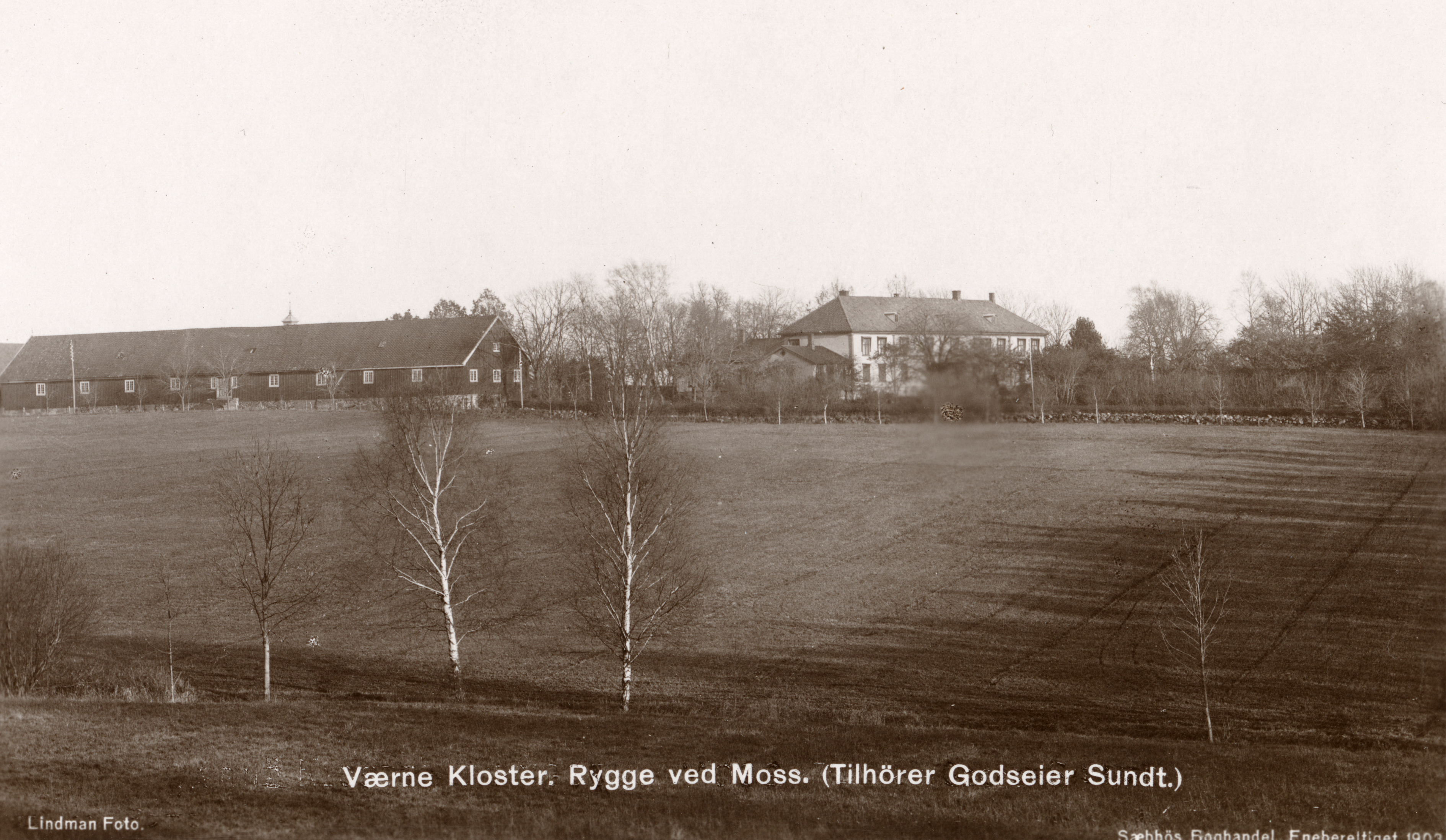 Værne kloster i Rygge, Østfold Tilhører godseier Sundt. Sæbbös Boghandel. Eneberettiget 1903